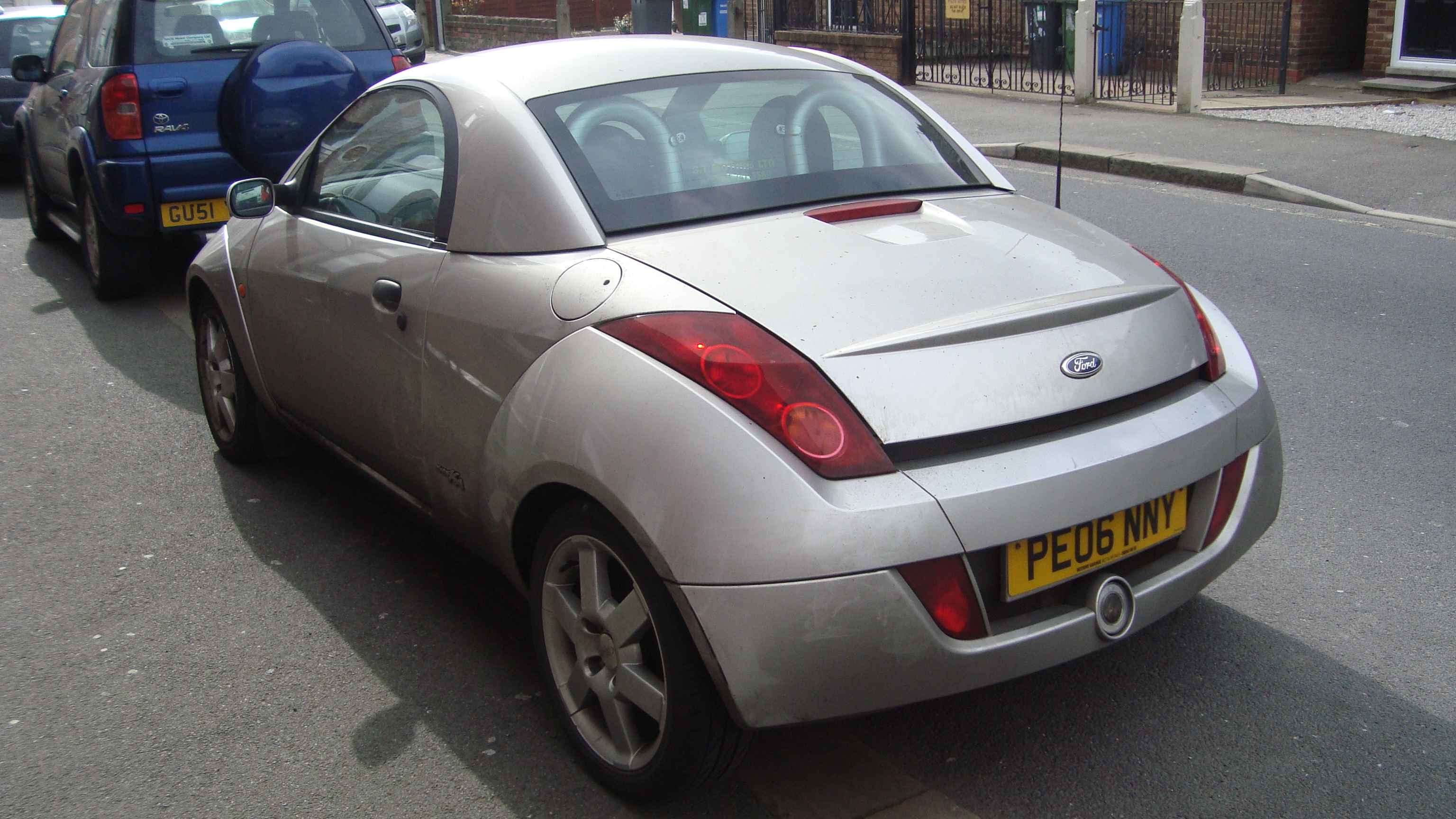 2006 Ford Streetka 1.6 Winter